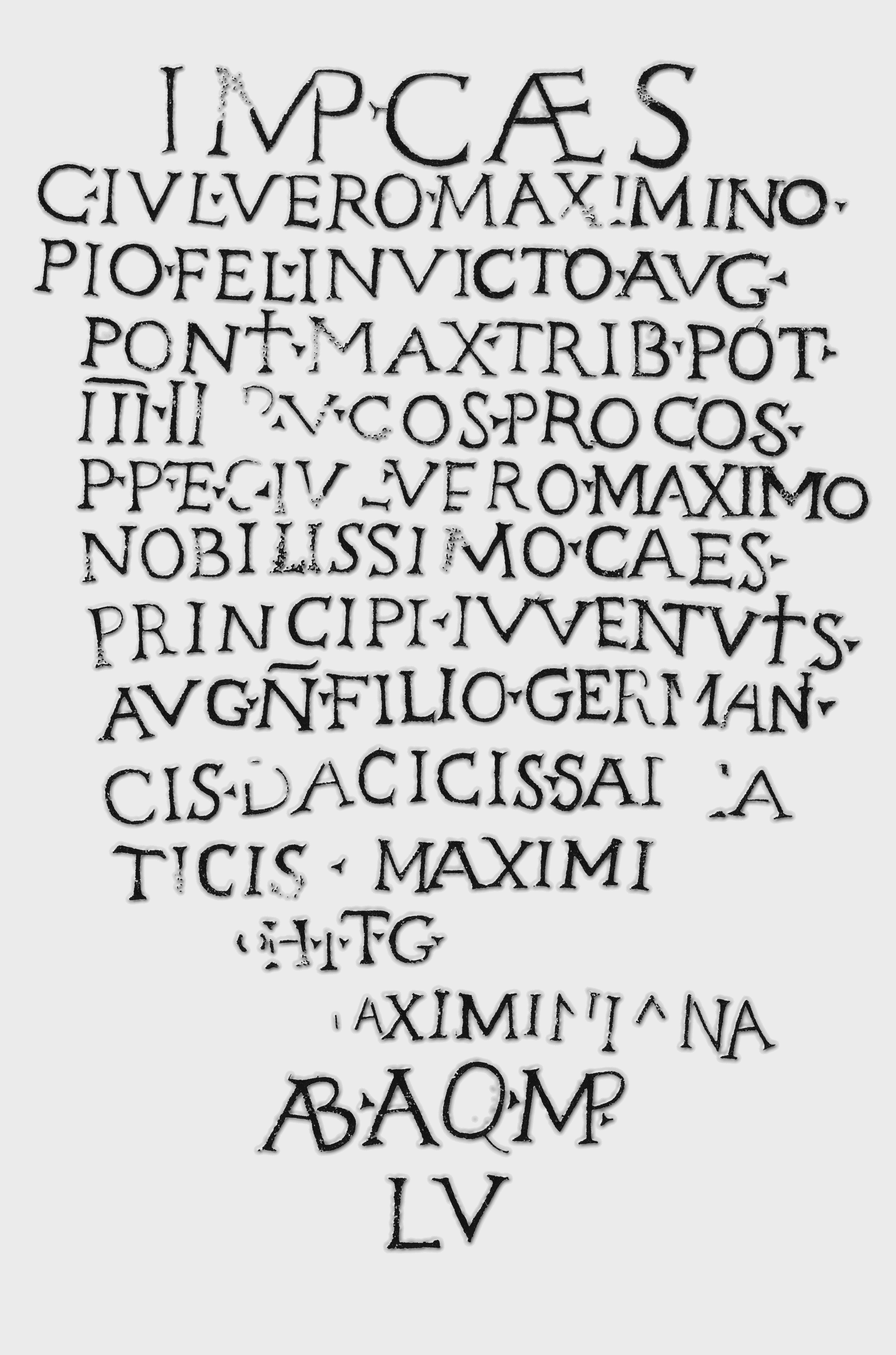 Inschrift eines römischen Meilensteins aus Baracs (Annamatia, Provinz Pannonia inferior), Ungarn (CIL III 10639): Imp(eratori) Caes(ari) / C(aio) Iul(io) Vero Maximino / Pio Fel(ici) Invicto Aug(usto) / pont(ifici) max(imo) trib(unicia) pot(estate) / III imp(eratori) V co(n)s(uli) proco(n)s(uli) / p(atri) p(atriae) et C(aio) Iul(io) Vero Maximo / nobilissimo Caes(ari) / principi iuventutis / Aug(usti) n(ostri) filio Germani/cis Dacicis Sarma/ticis maximis / coh(ors) I T(hracum) G(ermanica) / Maximiniana / ab Aq(uinco) m(ilia) p(assuum) / LV